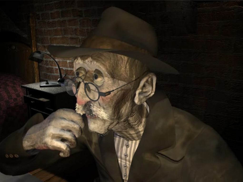 Capture d'écran du jeu vidéo L'Amerzone (1999), développé et édité par Microïds.